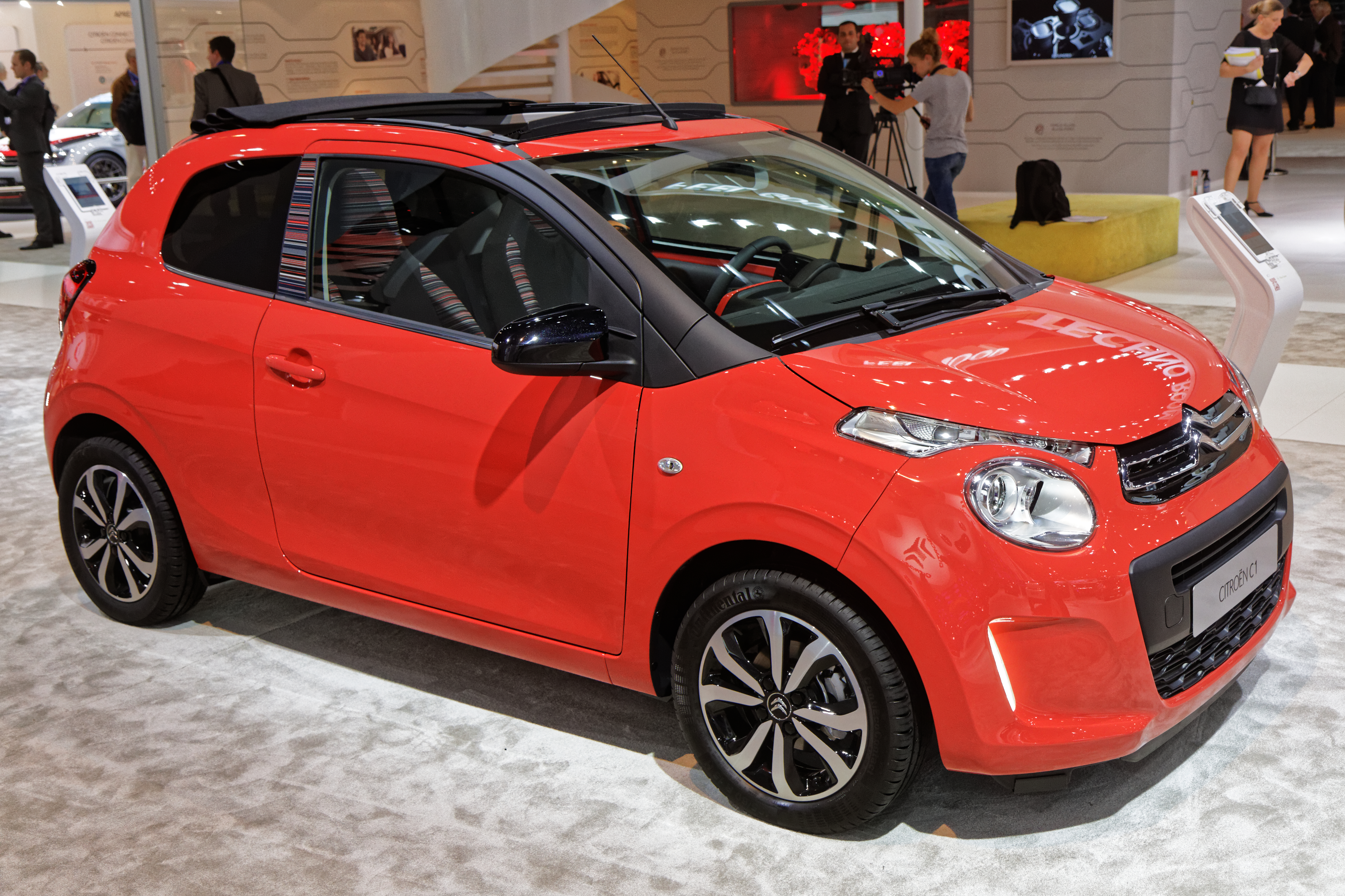 Une Citroën C1 présentée lors du mondial de l'automobile de Paris 2014.